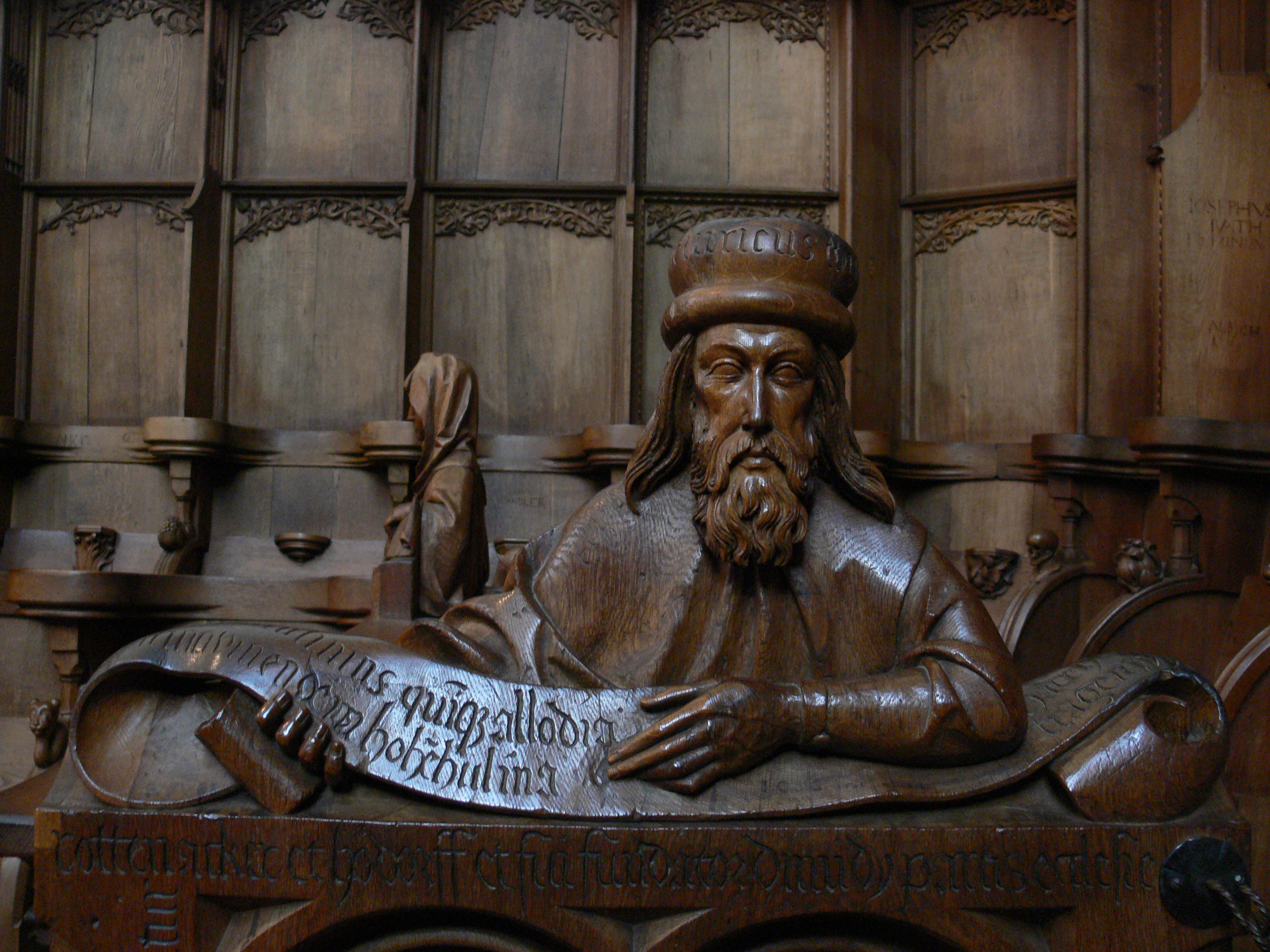 Kloster Blaubeuren, Klosterkirche, Chorraum Chorgestühl von Jörg Syrlin d. J., 1493 Stifterfigur Graf Heinrich von Tübingen („Contulimus quinque allodia berghulina, winendia, hohenhulina, hadenhusen, tragenwyler.“)